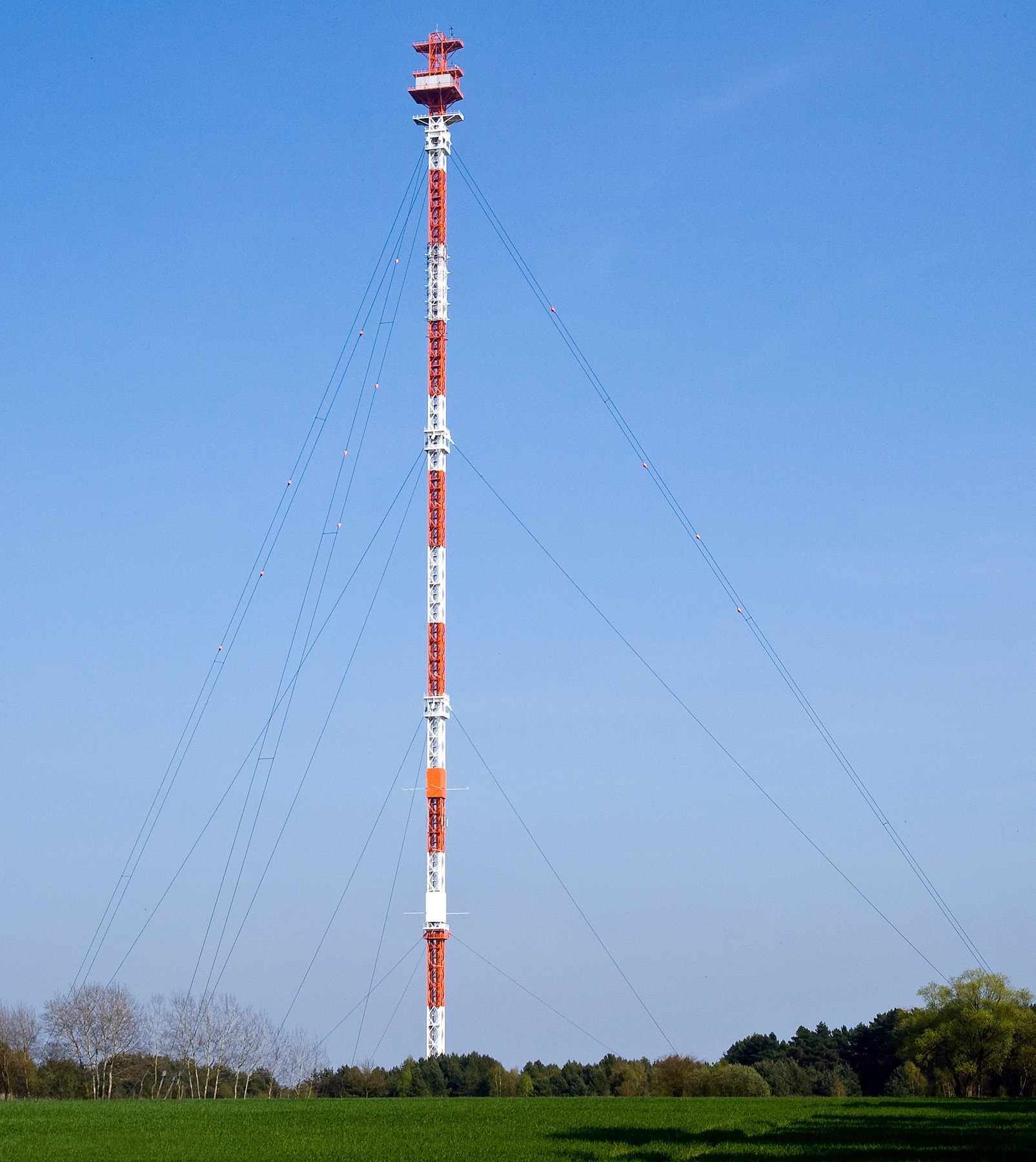 Der Sender Gartow 2 ist ein 344 m hoher, abgespannter Stahlfachwerkmast des Senders Höhbeck (Funkübertragungsstelle Gartow 1/2). Der Turm wurde 1977/78 errichtet. Er ist in vier Höhen bei 60 m, 132 m, 216 m und 312 m abgespannt. Gartow 2 stellte eine Richtfunkstrecke mit direkter Sichtverbindung zur Gegenstelle Berlin-Frohnau her. Gegenwärtig betreibt der Deutsche Amateurfunkdienst auf dem Turm eine Relaisstation für Amateurfunk-Fernsehen. Außerdem betreibt das Institut für Stahlbau der TU Braunschweig einer Windmessanlage. Im Abstand von 18 m werden die Windgeschwindigkeiten und -richtungen mit Anemometern und Windfahnen gemessen.